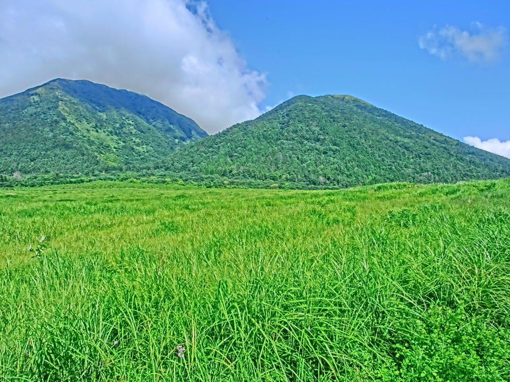 西の原からみた三瓶山。右が子三瓶山、左が男三瓶山。女三瓶山や孫三瓶山は陰になって見えない